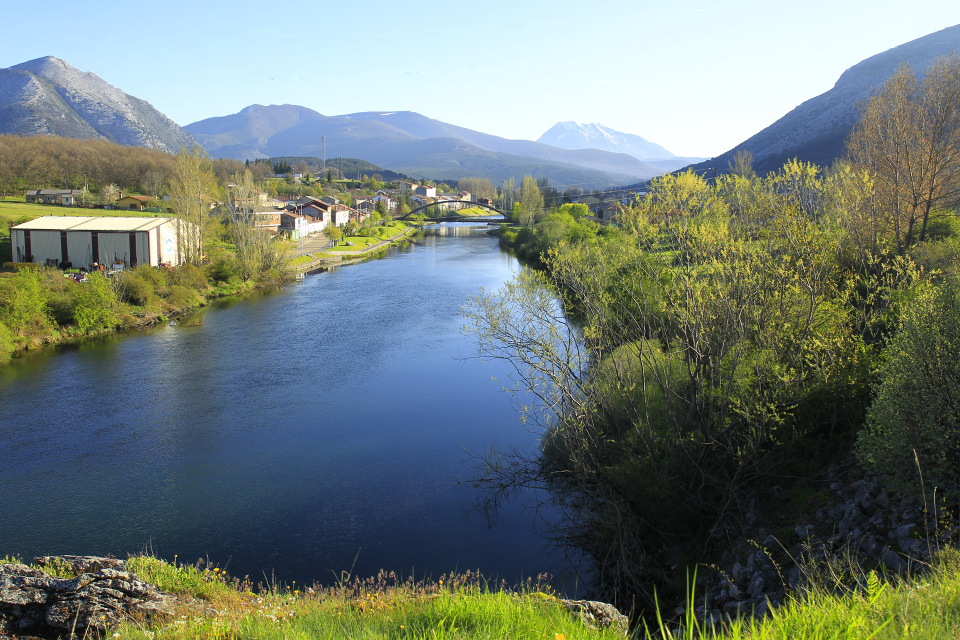 Riberas del río Carrión y afluentes This is a photography of a Site of Community Importance in Spain with the ID: ES4140011. Natura2000 entry, EEA entry